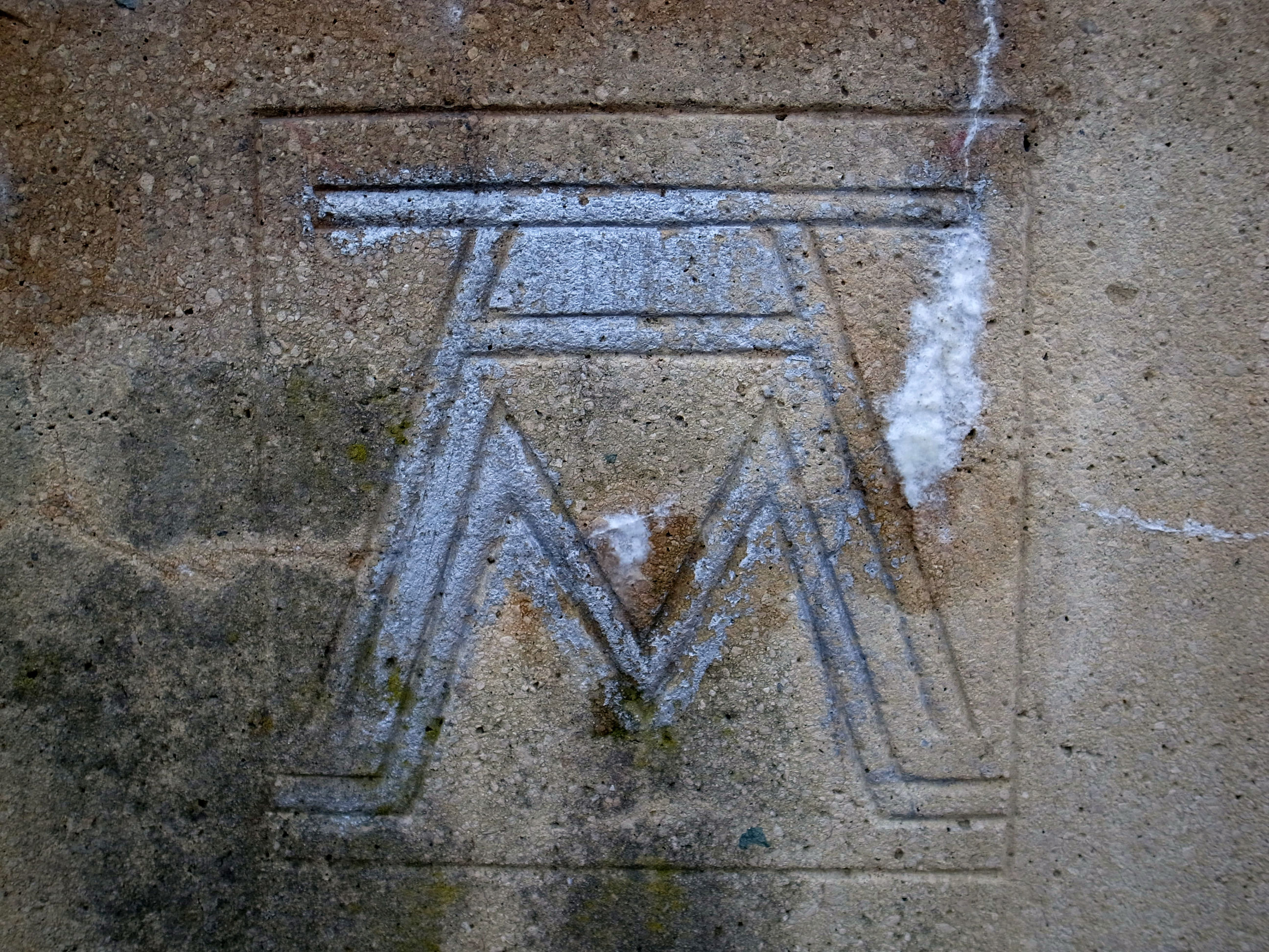 Albin Müller,Signatur am Bölke Grabmal in Dessau (Größe 200 x 200mm)